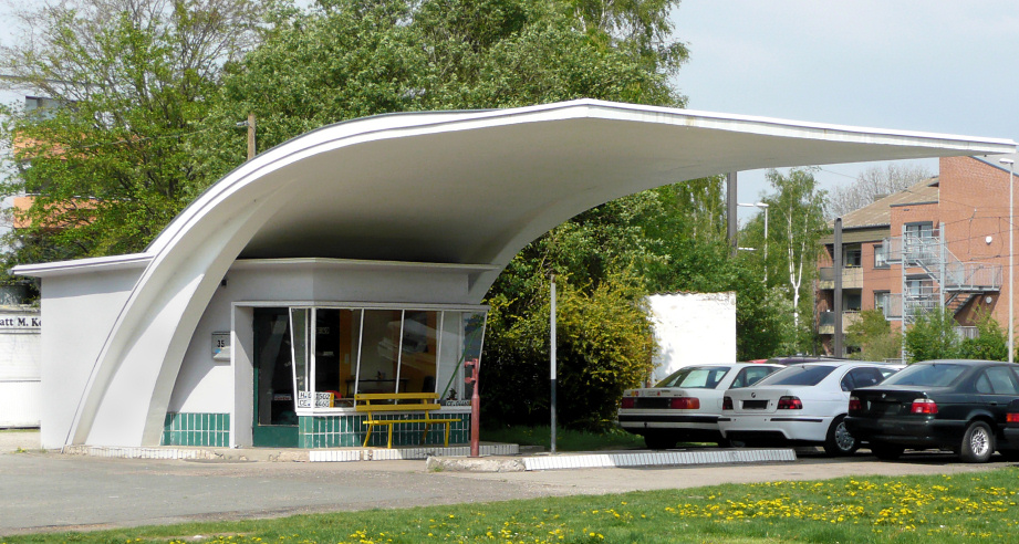 Typ 3 der standardisierten Tankstellen der Firma Caltex, erbaut 1957 in Hannover Badenstedt